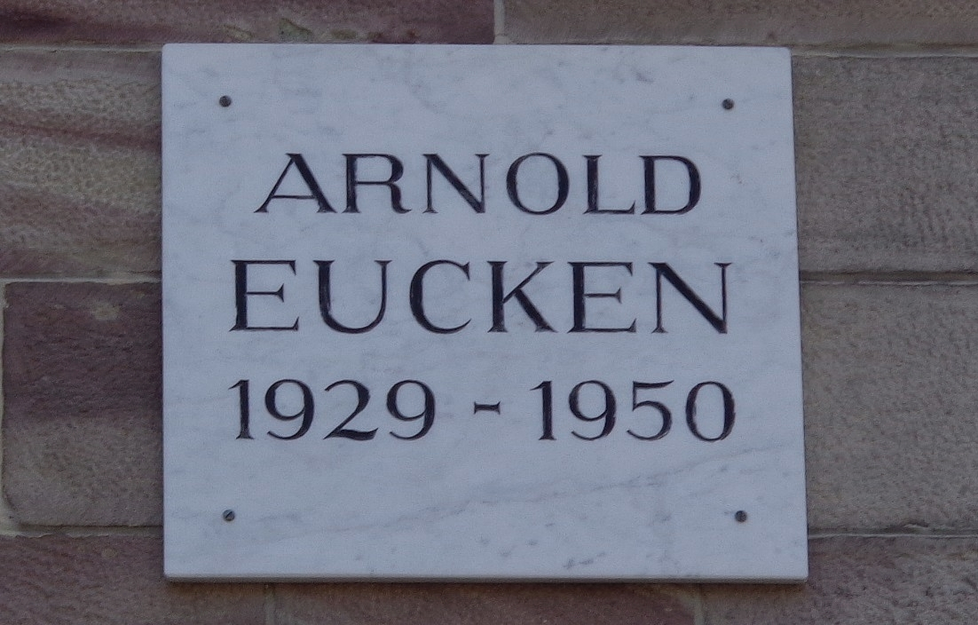 Göttinger Gedenktafel für Arnold Eucken, Physikochemiker (Bürgerstraße 50)